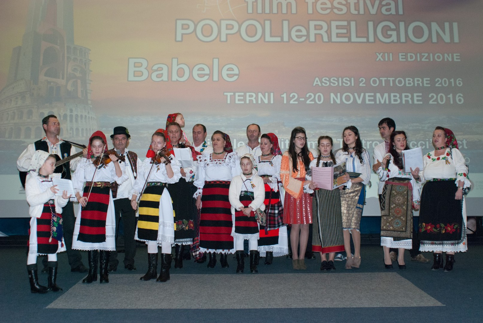 Popoli e Religioni - Terni Film Festival, Focus Romania 2017